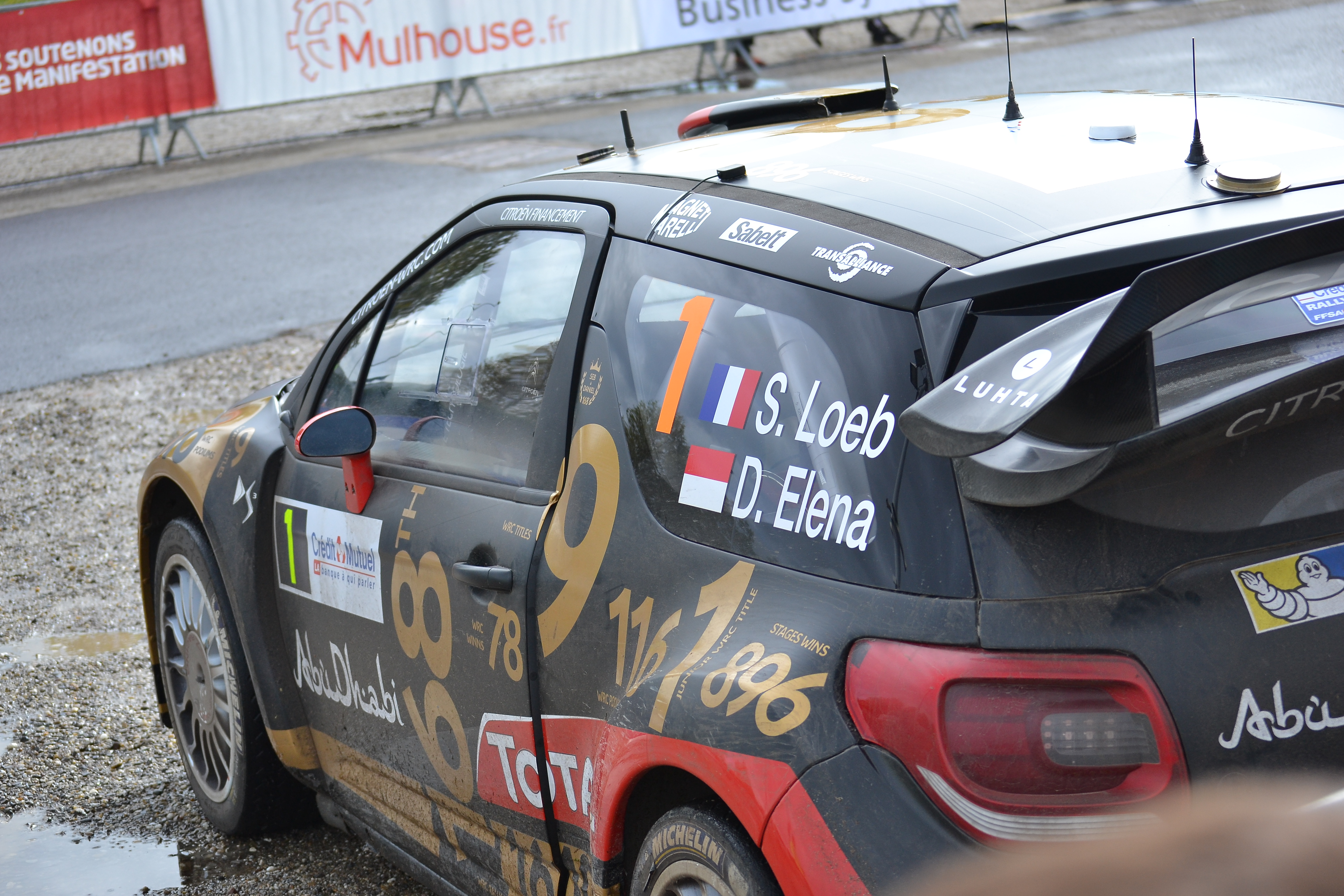 La voiture de Sébastien Loeb au parc d'assistance de Colmar durant le Rallye de France-Alsace 2013. La voiture est ornée d'une livrée couleur noire et or reprenant les principaux records de la carrière du nonuple champion du monde.